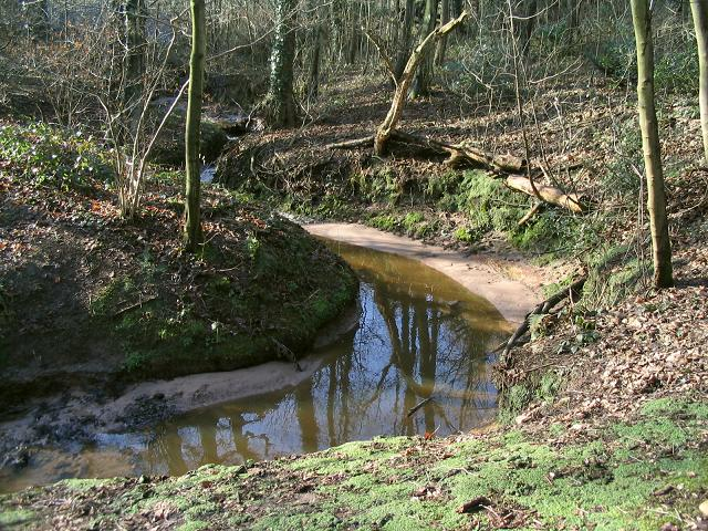 Prenton Brook in Barnston Dale